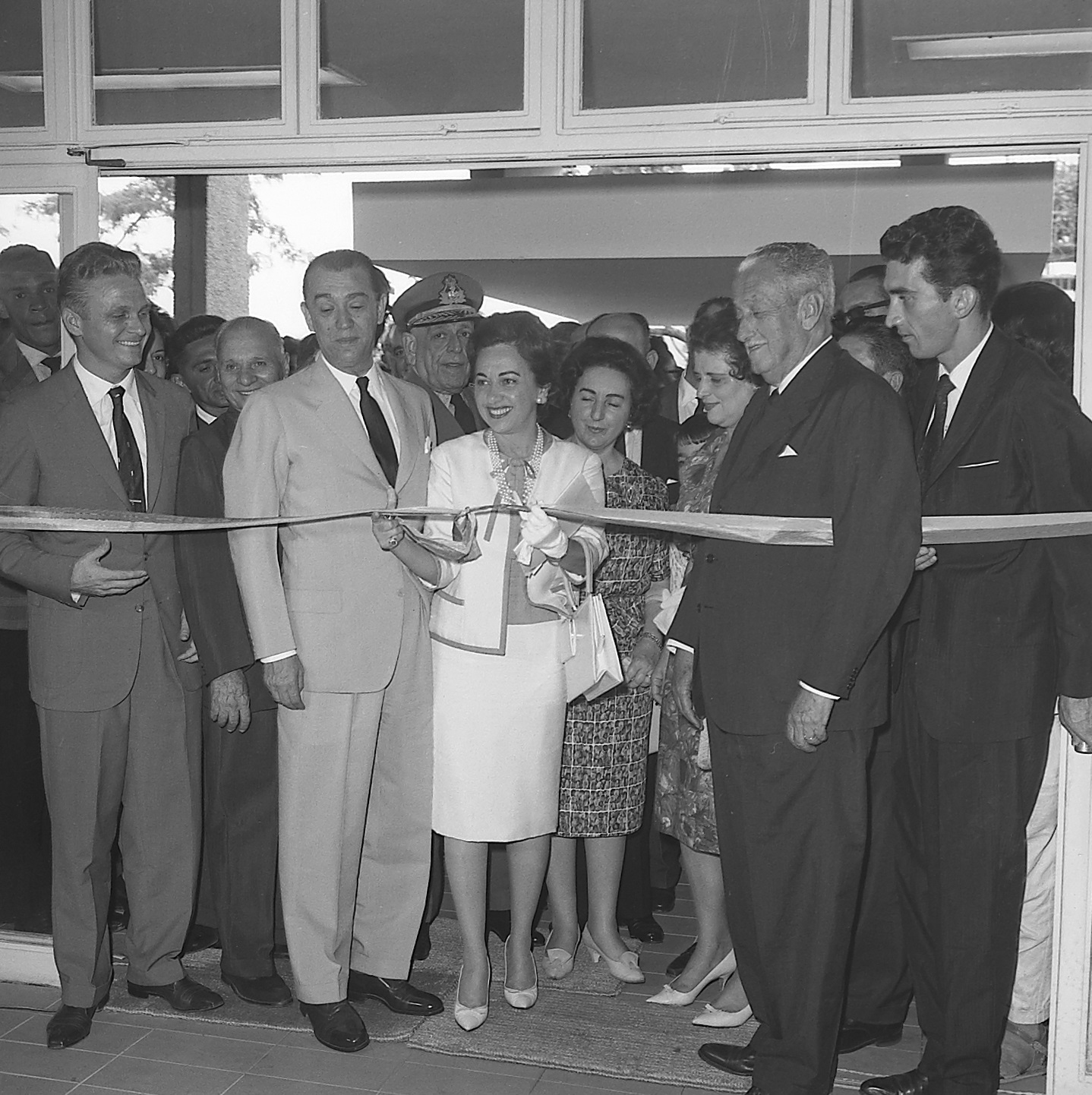 Imagem do Fundo Agência Nacional, do Arquivo Nacional